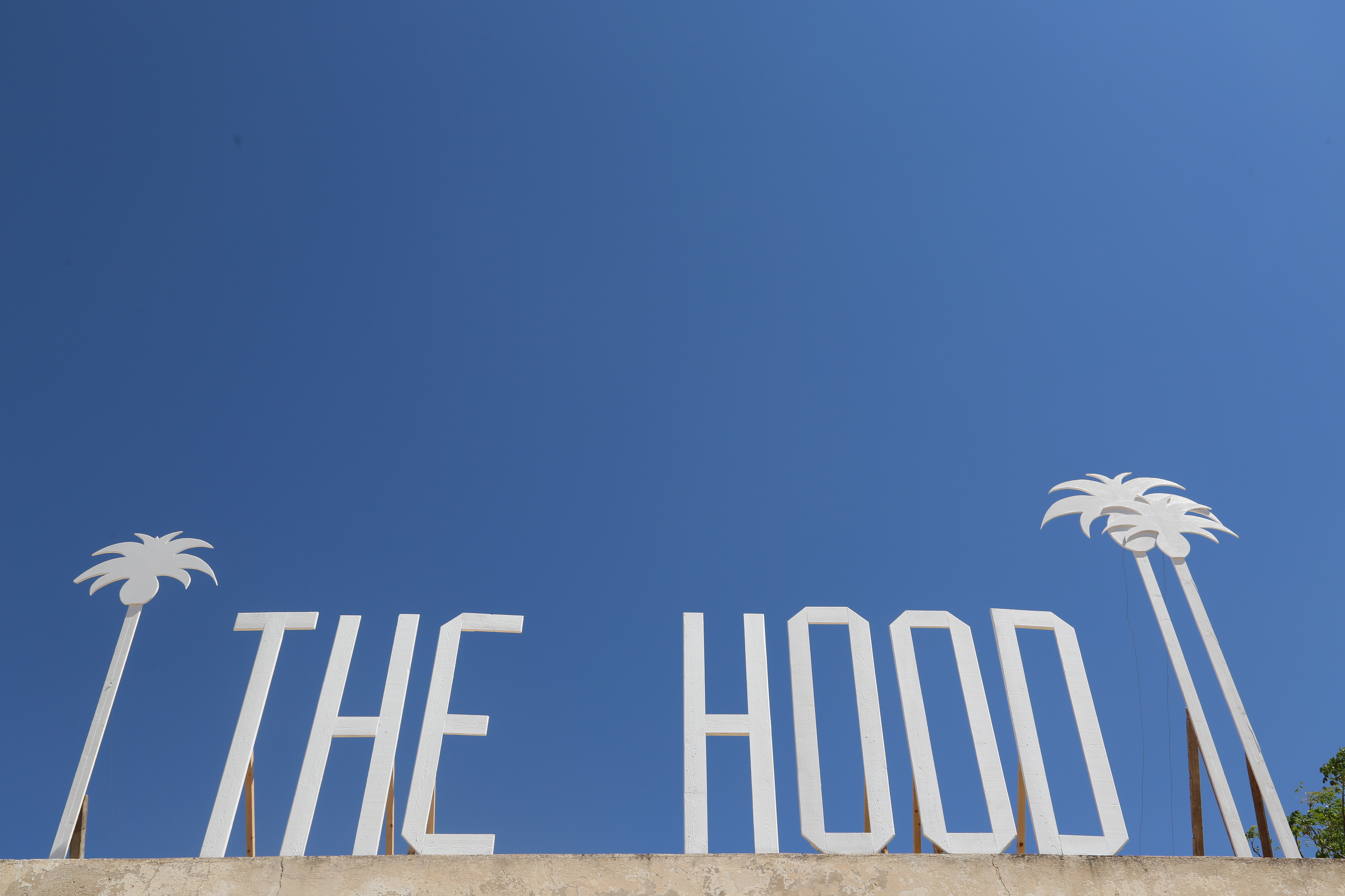 Installation de Rodolphe Cintorino dans l'abattoir du village d'Erriadh dans le cadre du projet Djerbahood